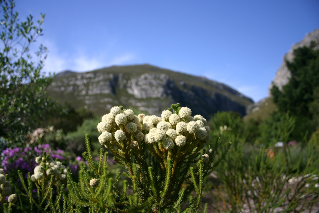 Brunia nodiflora Bruniaceae. Harold Porter Botanical Garden